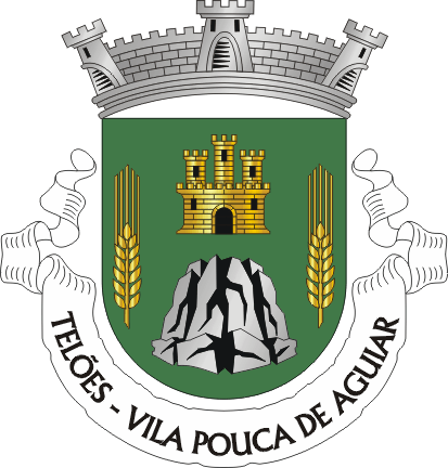 Brasão da freguesia de Telões (concelho de Vila Pouca de Aguiar)